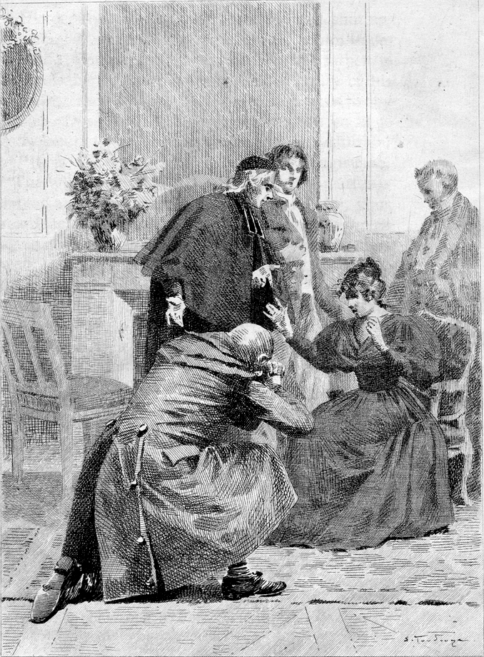 Title page of Honoré de Balzac's Ursule Mirouët (1841-2).